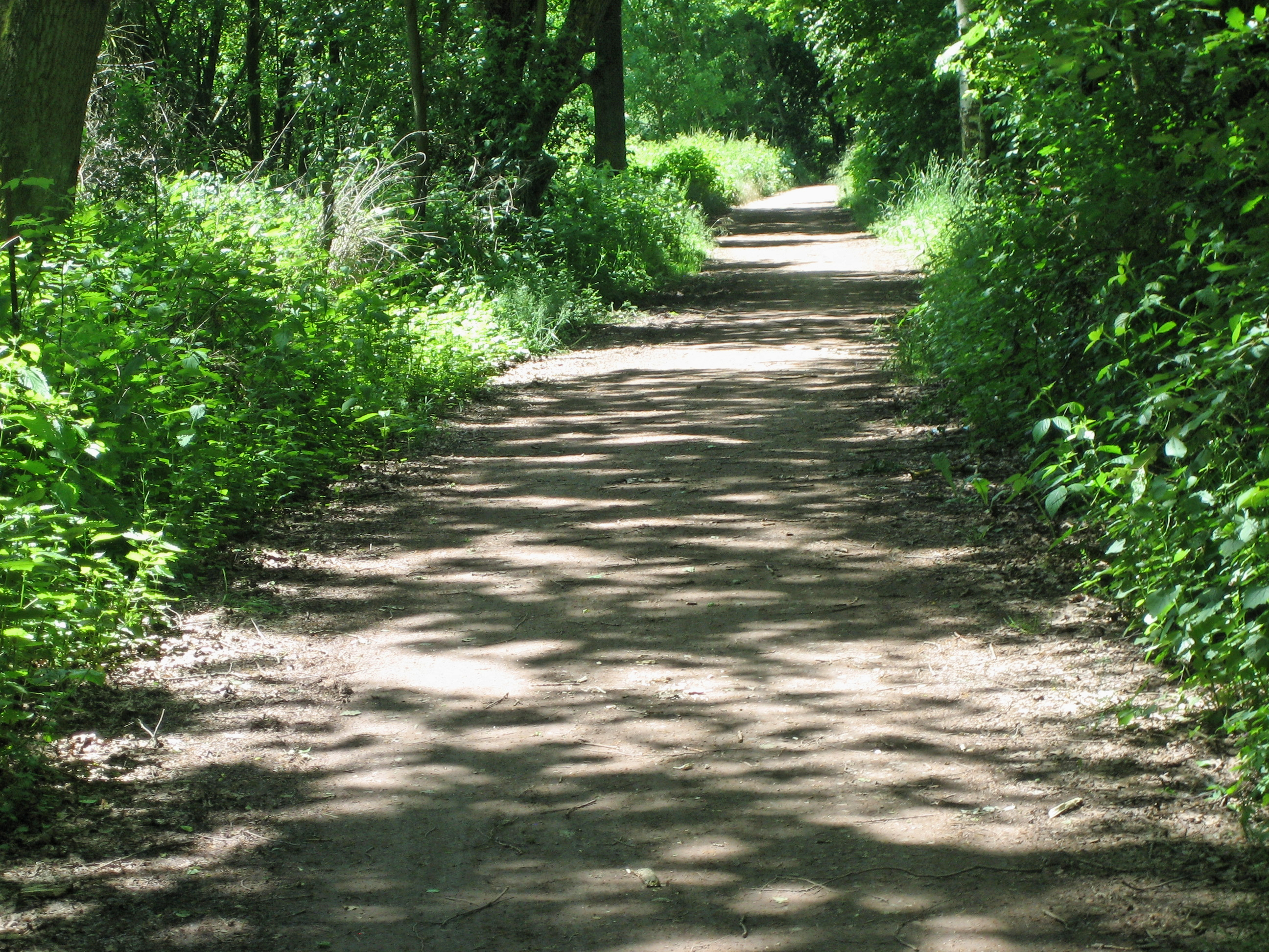 Ehemalige Bahntrasse bei Erlenbach